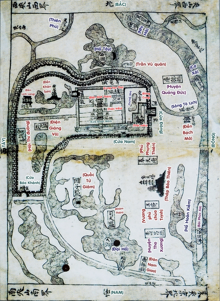 Bản đồ kinh thành Thăng Long (kèm chú thích) theo Hồng Đức bản đồ sách (洪德版圖冊), ban hành vào đời vua Lê Thánh Tông, năm Hồng Đức thứ 21 (tức năm 1490).